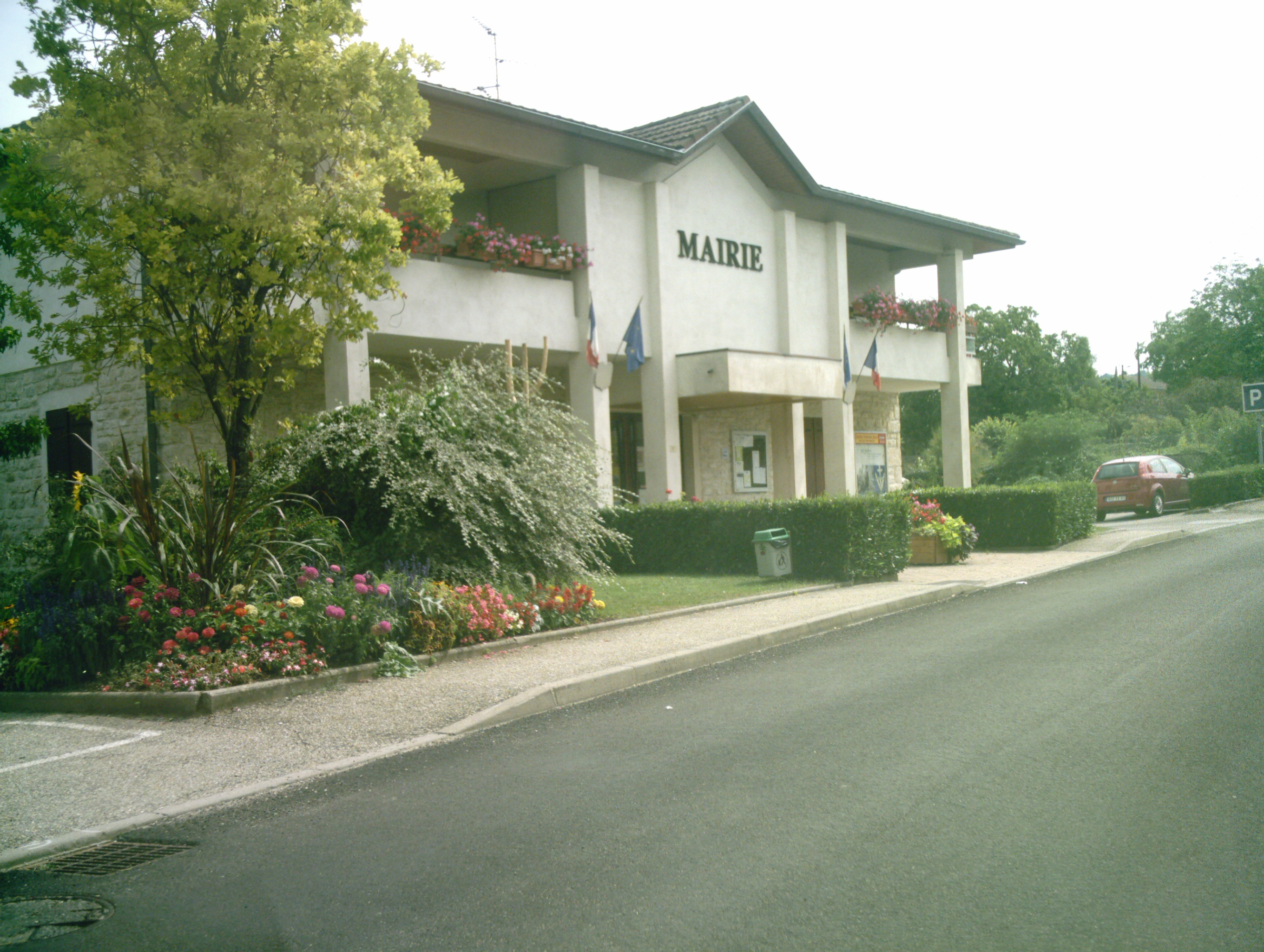 La mairie d'Hautecourt-Romanèche